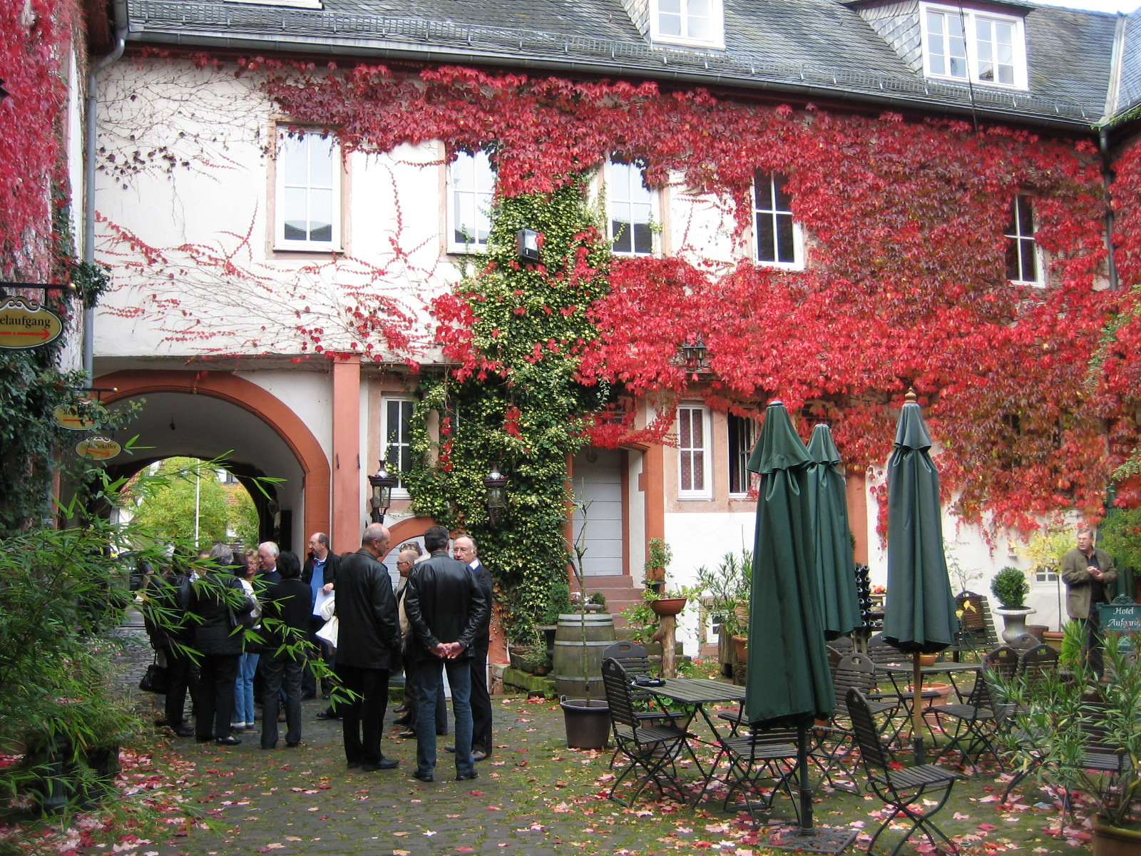 Schloss Rothenbuch, Spessart, Teilansicht des Innenhofs